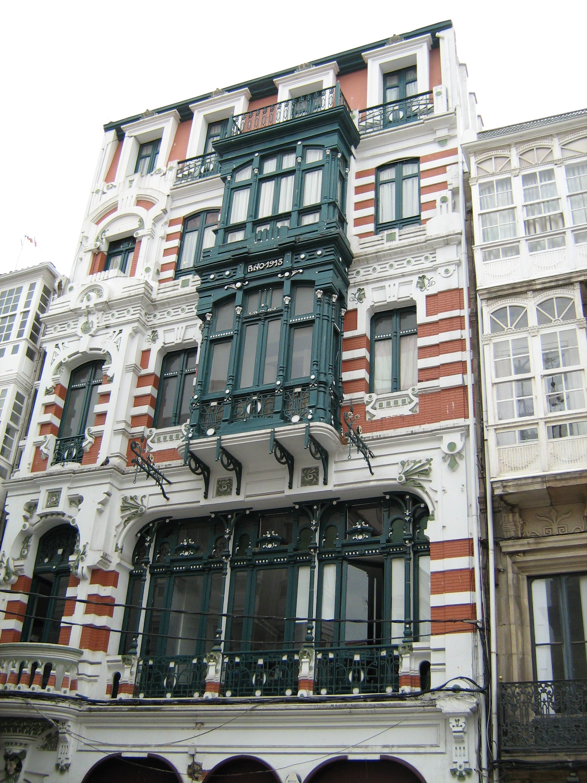 Edificio na rúa de San Nicolás da Coruña, de Ricardo Boán